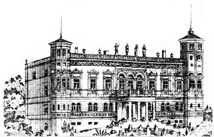 Rycina przedstawiająca zabytkowy pałac w Niechcicach